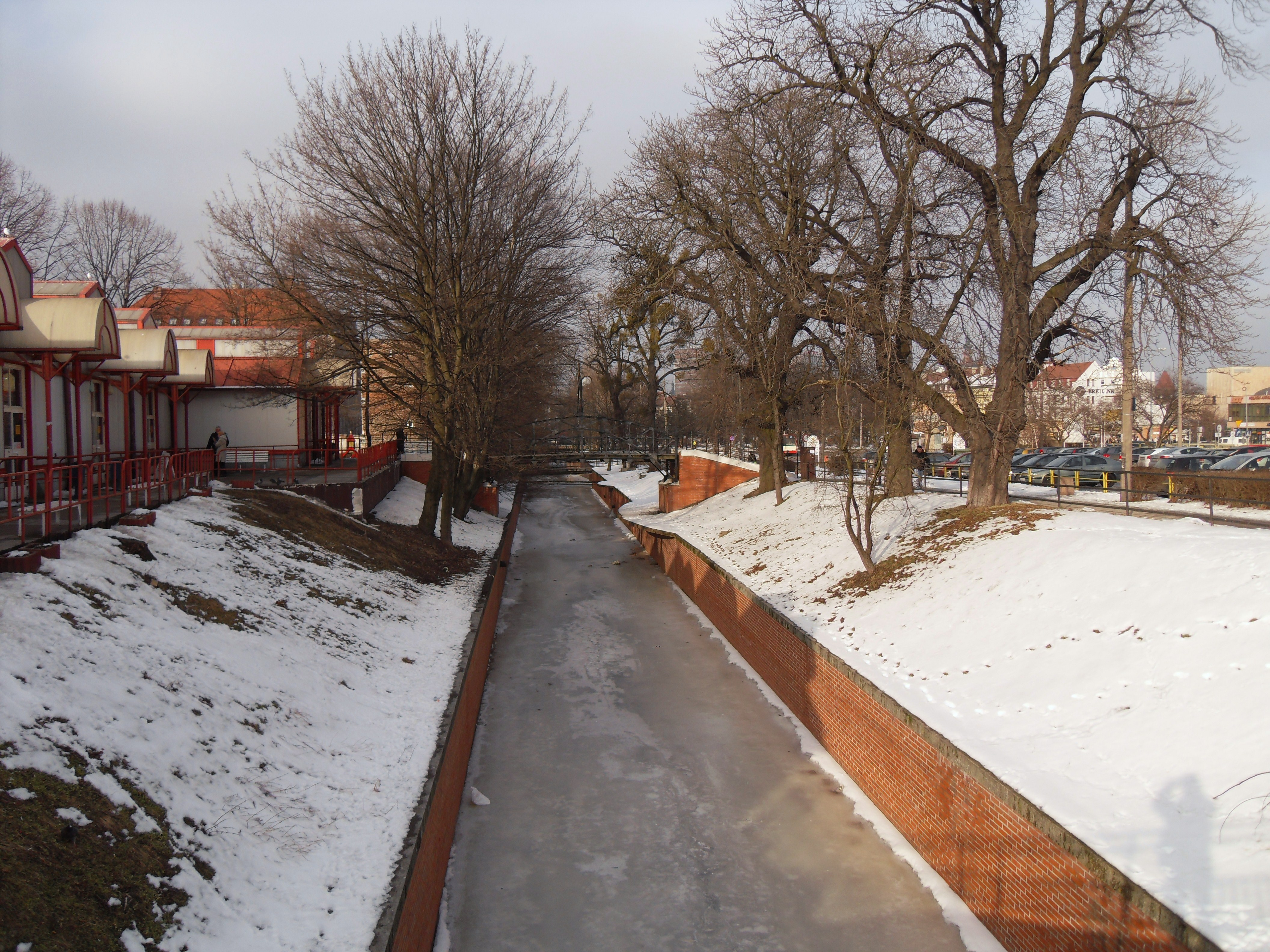 Kanał Raduni na styku Targu Rakowego z Targiem Siennym w Gdańsku, widok w kierunku północnym.